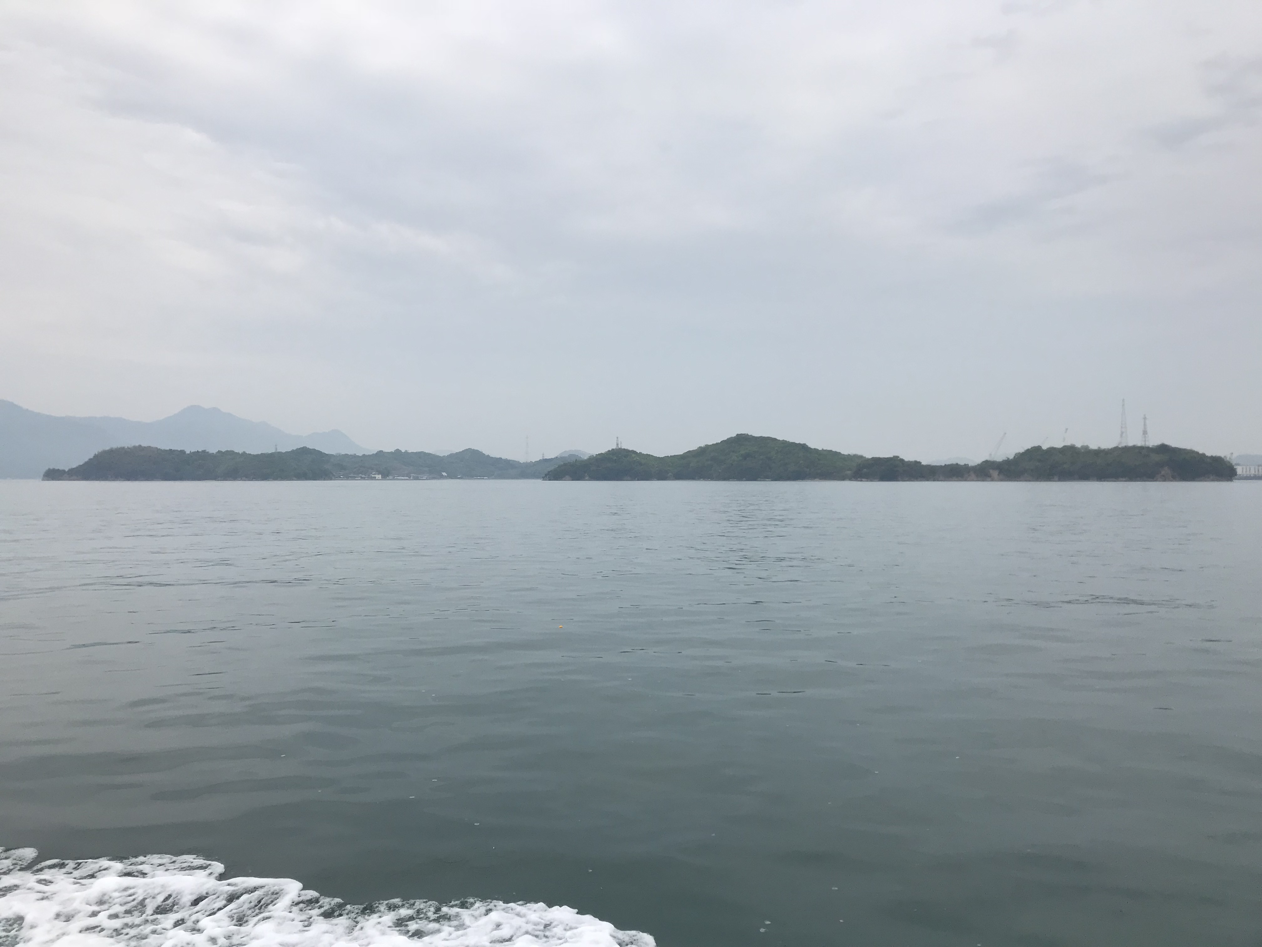 土生港行きの高速船より望む細島と小細島